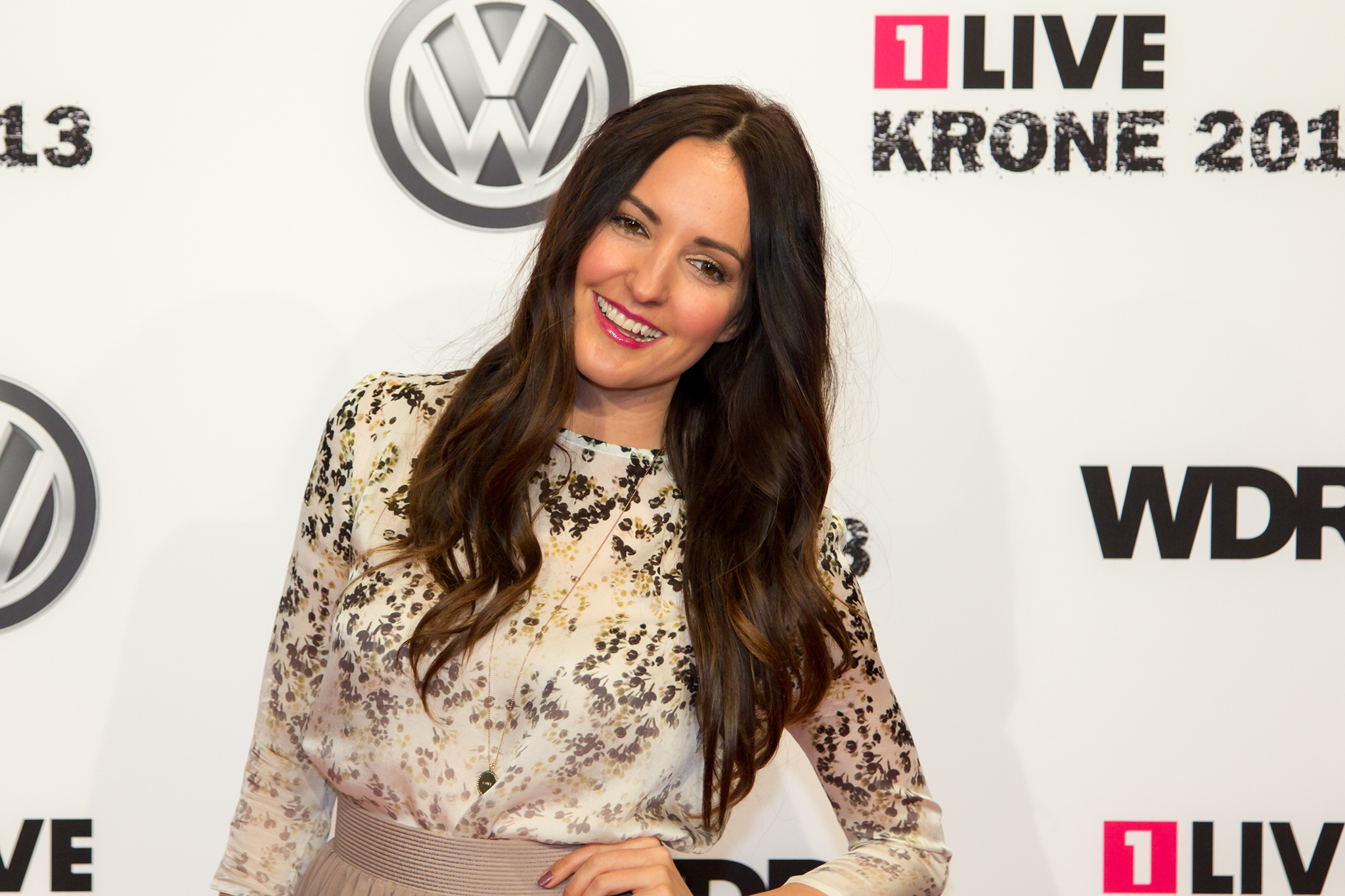 1 LIVE Krone 2013 Jonanna Klum